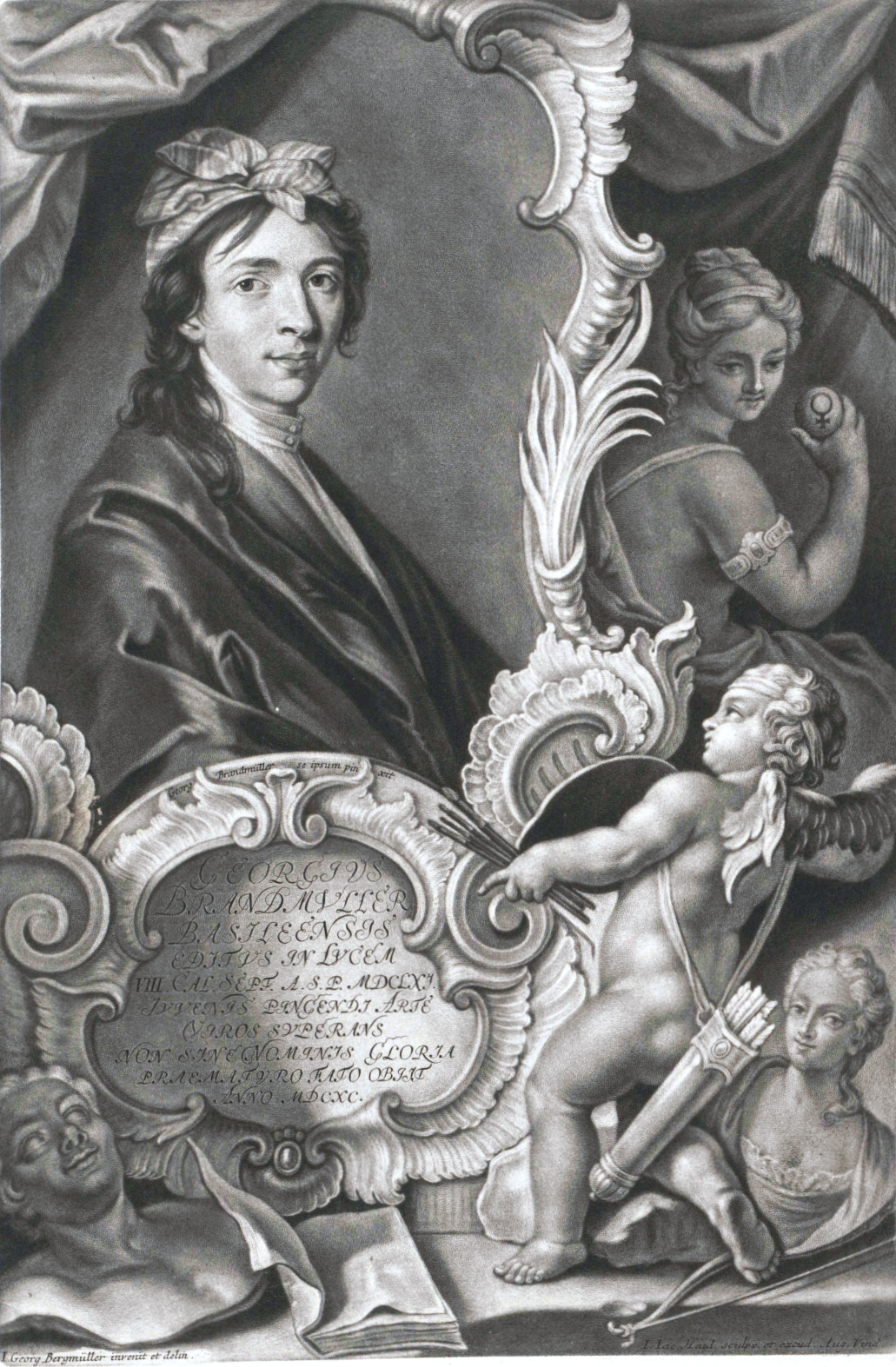 Selbstbildnis Georg Brandmüller (1661–690), Zeichner Johann Georg Bermüller (1688–1762)